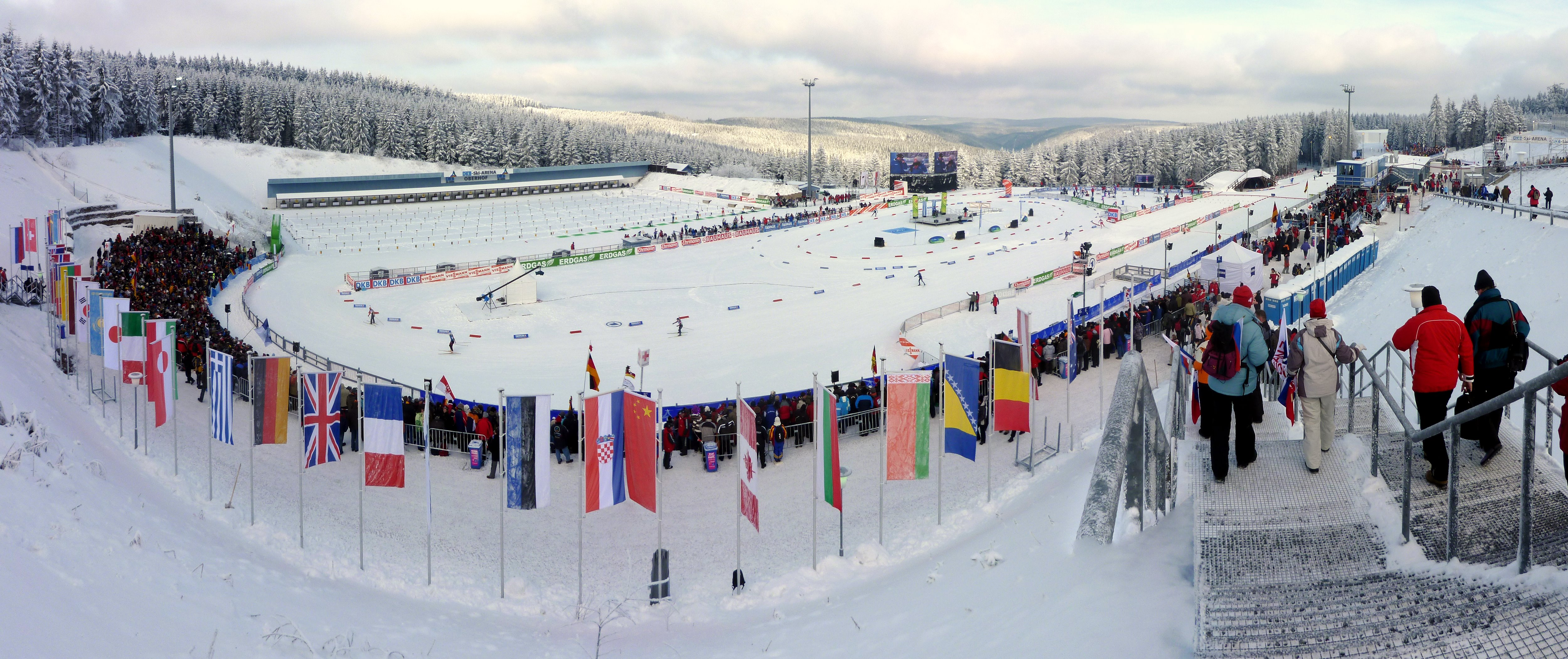 Oberhof, Skiarena